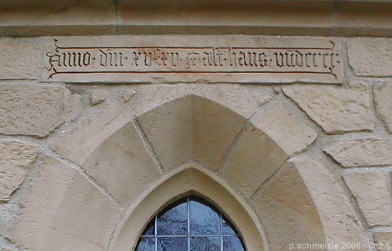 Evangelische Lambertuskirche in Pfaffenhofen (Württ.), Inschrift an der Sakristei, die Hans Wunderer als Baumeister ausweist